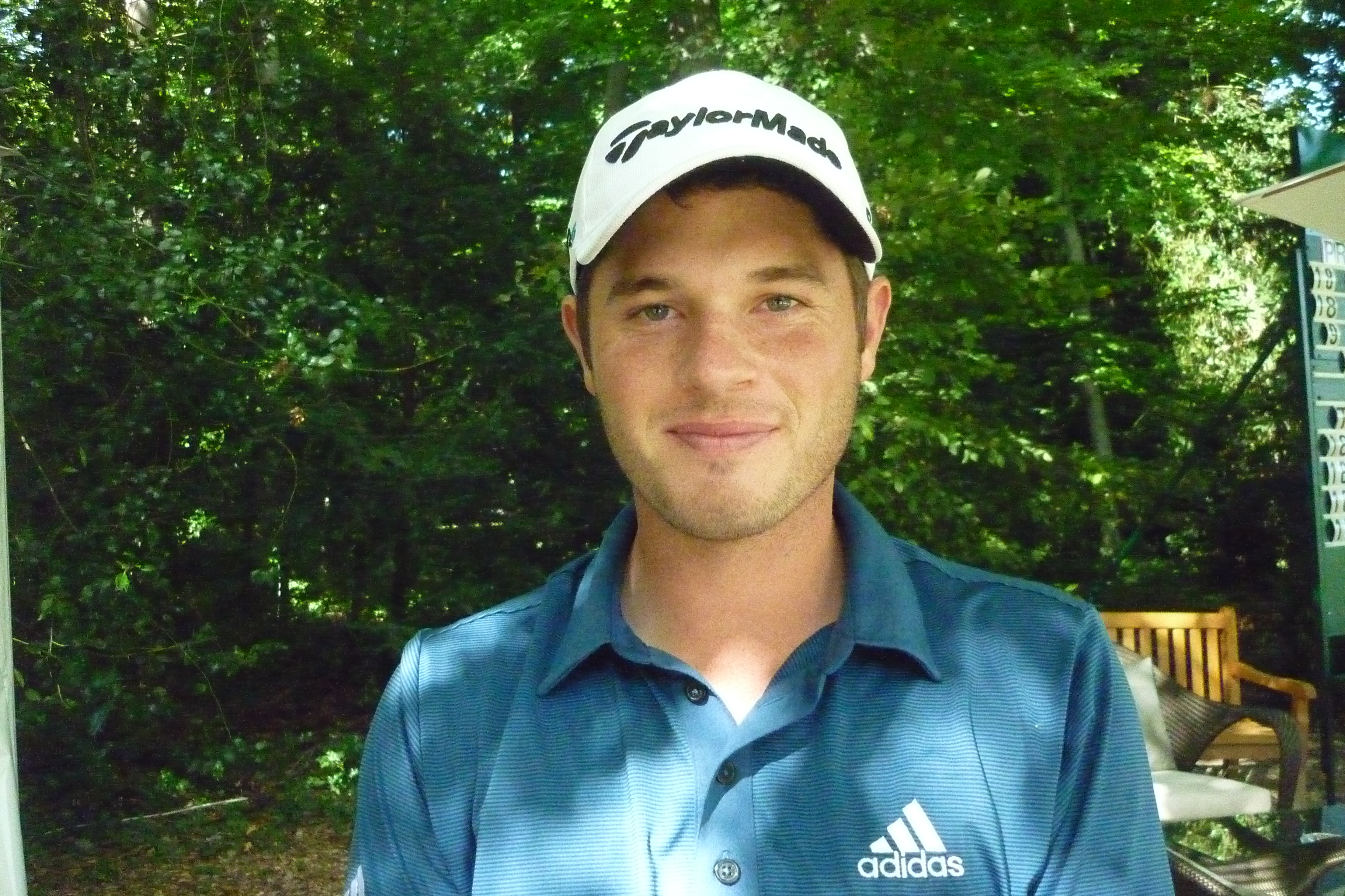 Sam Hutsby